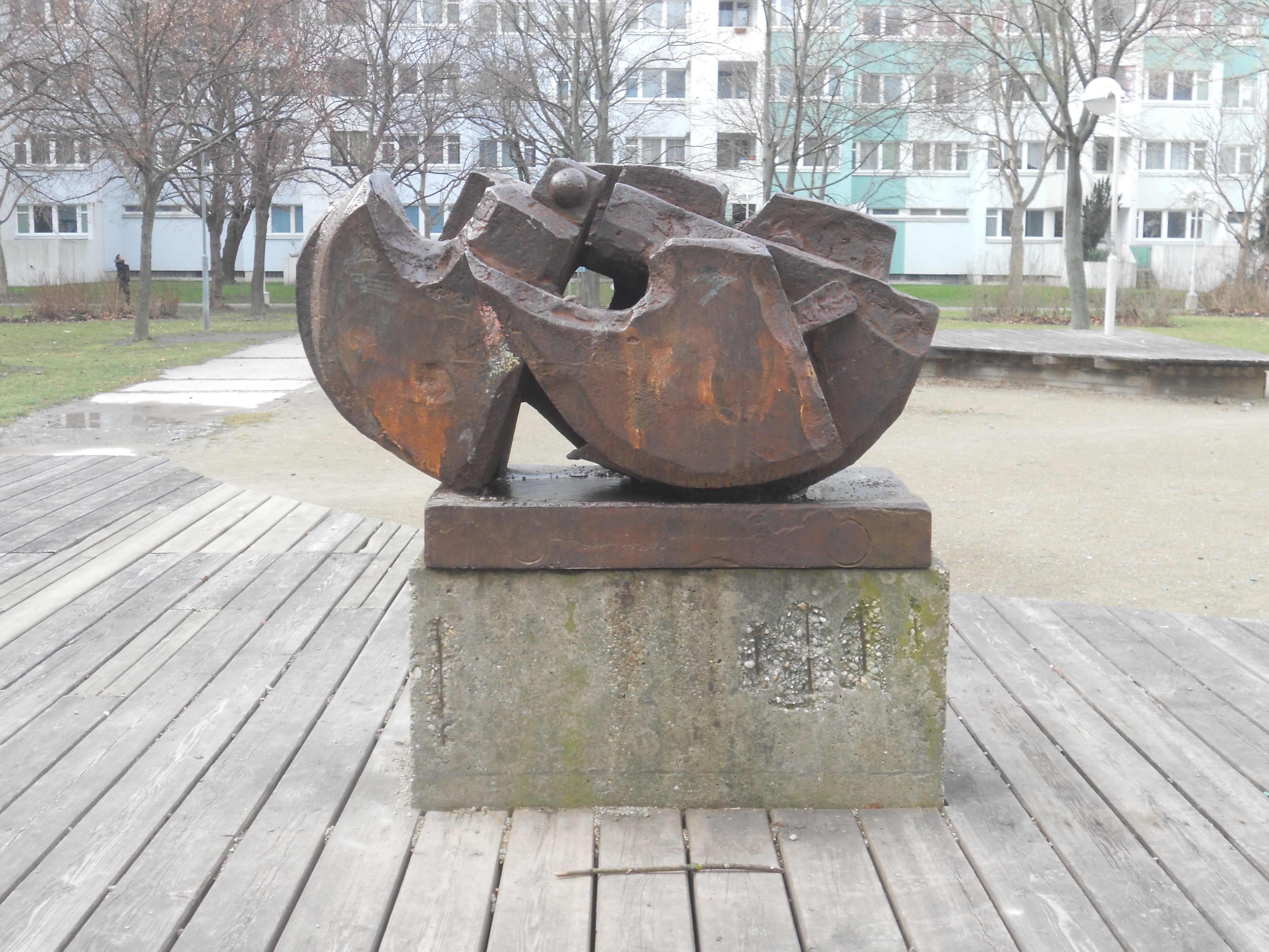 Skulptur "Dynamik I" von Karl Anton Wolf in einem Nebenhof der Wohnhausanlage Trabrenngründe